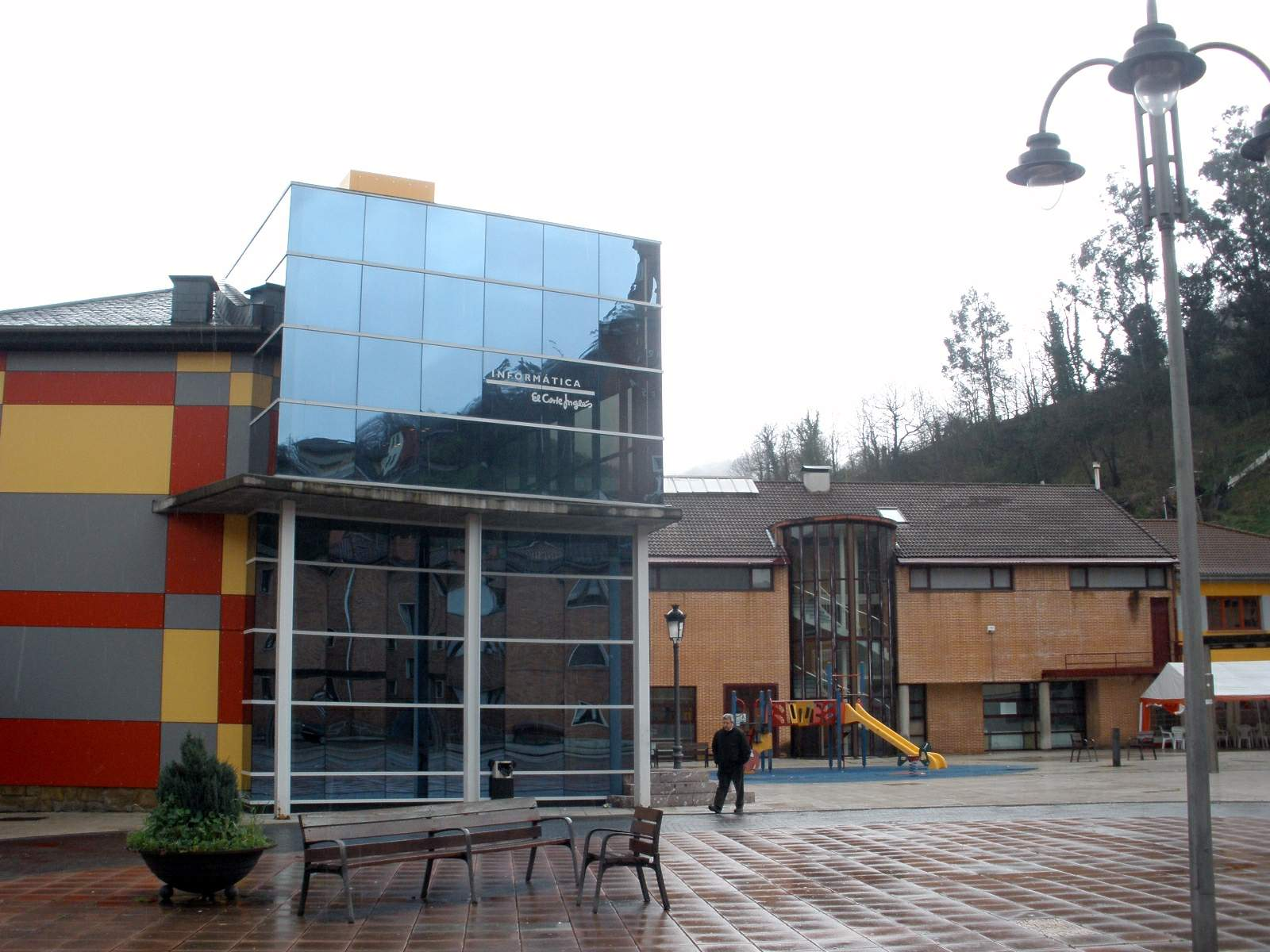 Blimea, San Martín del Rey Aurelio (Asturias)